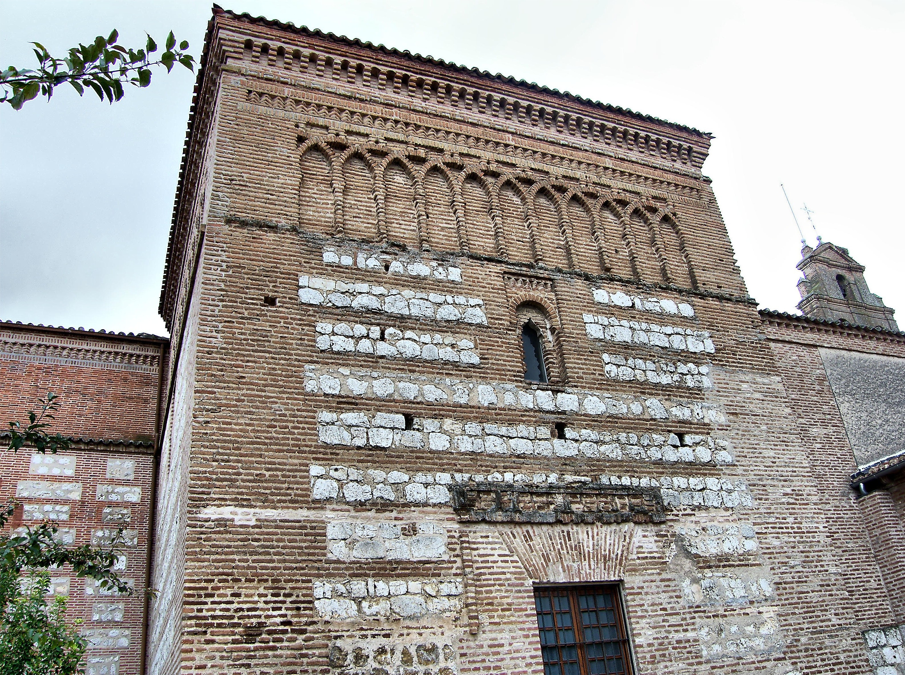 Convento de Santa Clara de Tordesillas